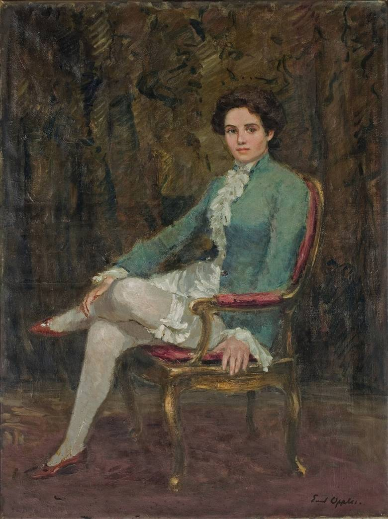 Frau im Theaterkostüm. Unten rechts signiert.